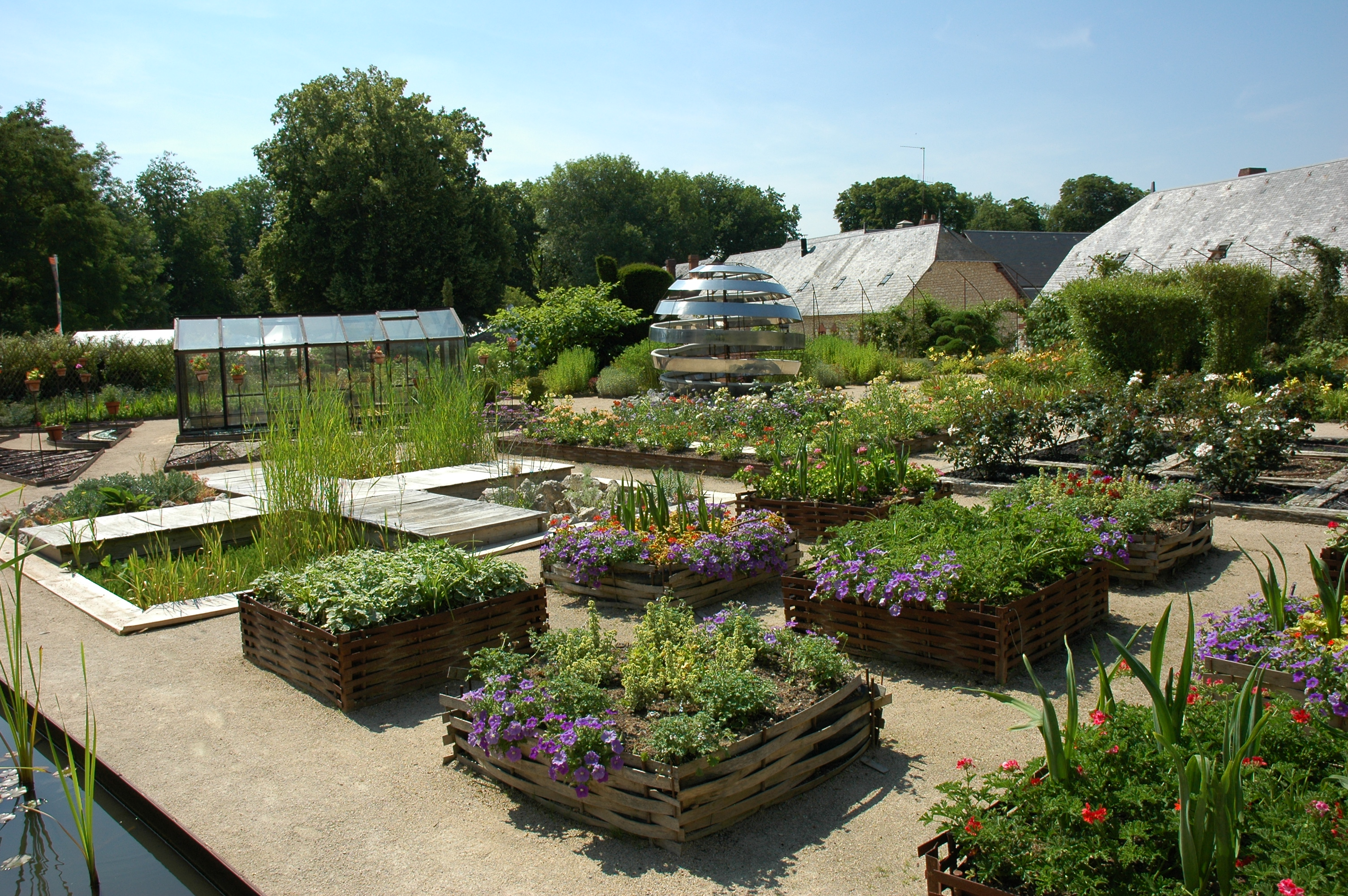 France Loir-et-Cher Festival jardins Chaumont-sur-Loire Photographie prise par GIRAUD Patrick